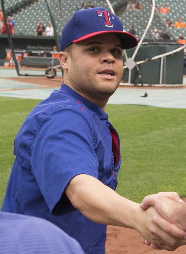 Wandy Rodríguez